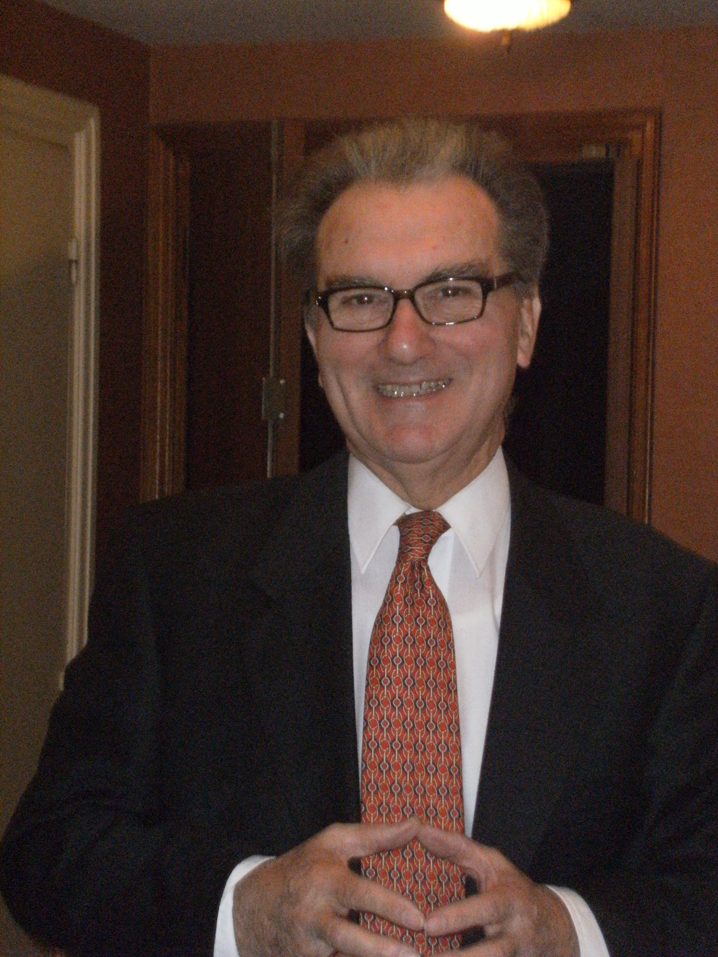 Photo de Guy Achard prise en 2009